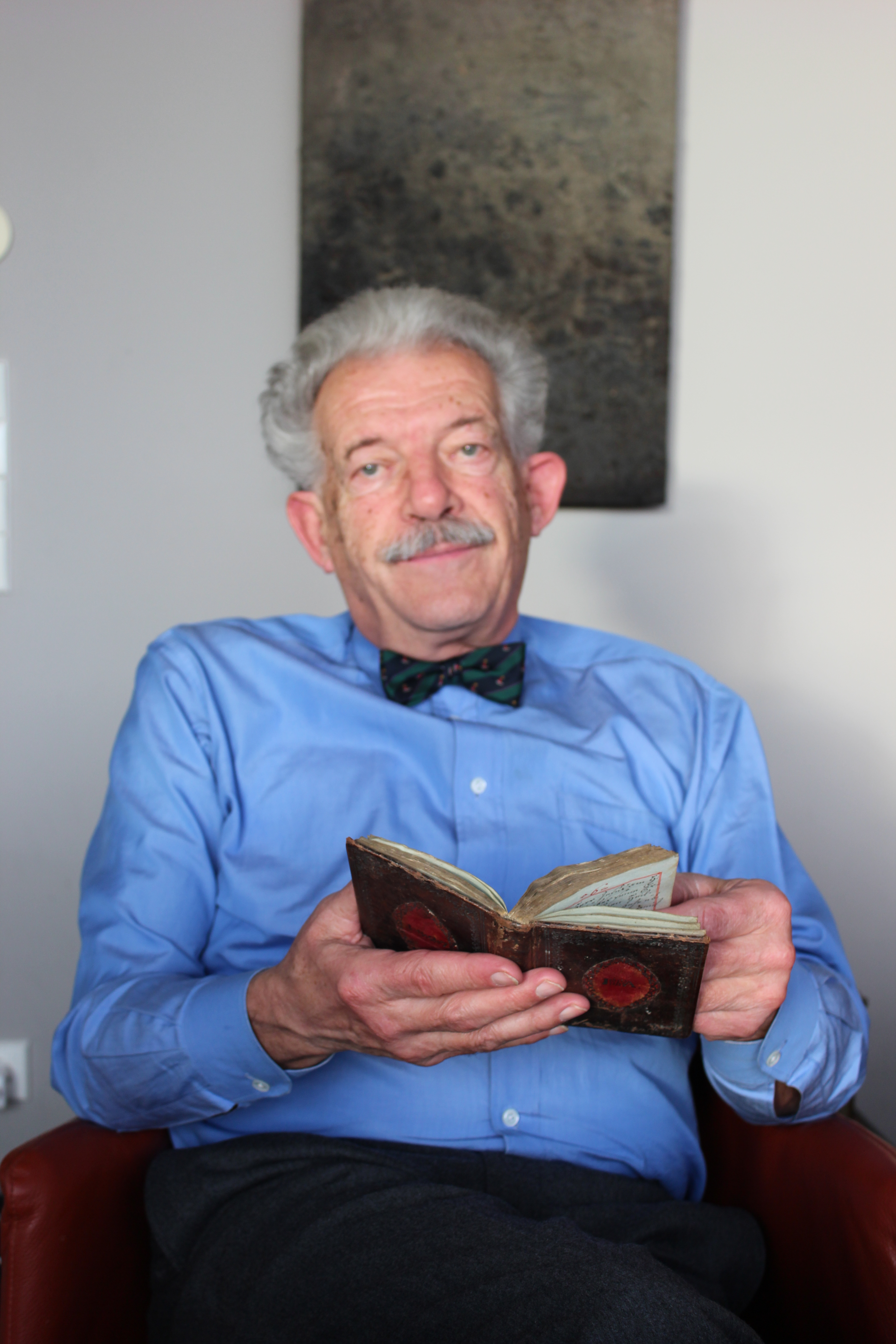 Foto von Mag.Dr.Dr Kurt Lettner